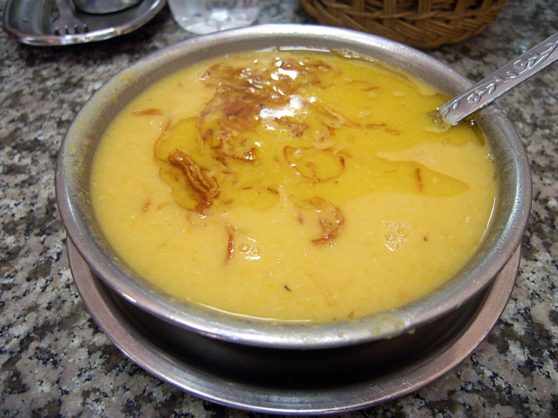 Gelbe Linsensuppe mit zerlassener Butter und Röstzwiebeln